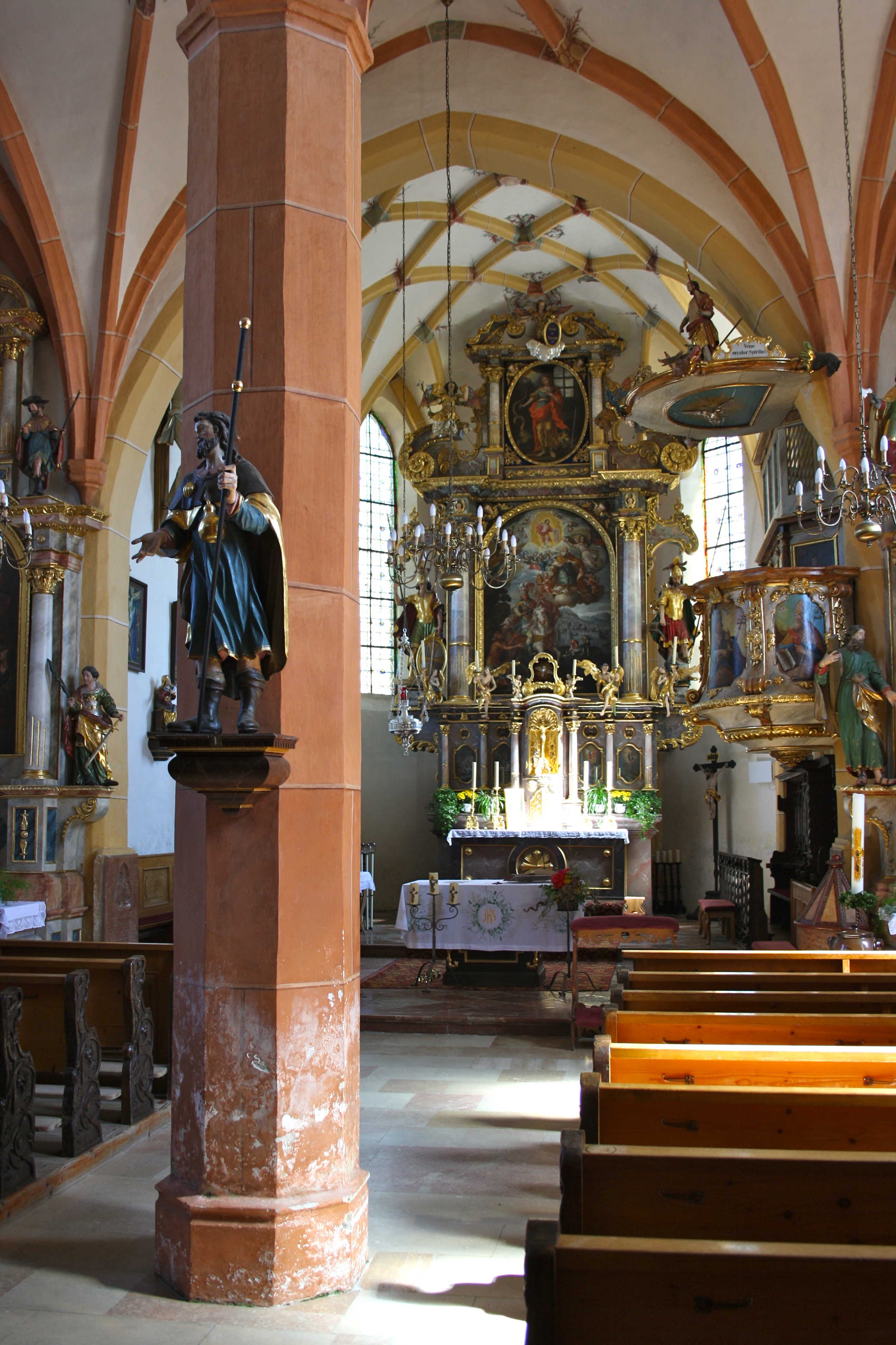 Kath. Pfarrkirche hl. Martin und Friedhof mit Ummauerung, Torbau und Kriegerdenkmal